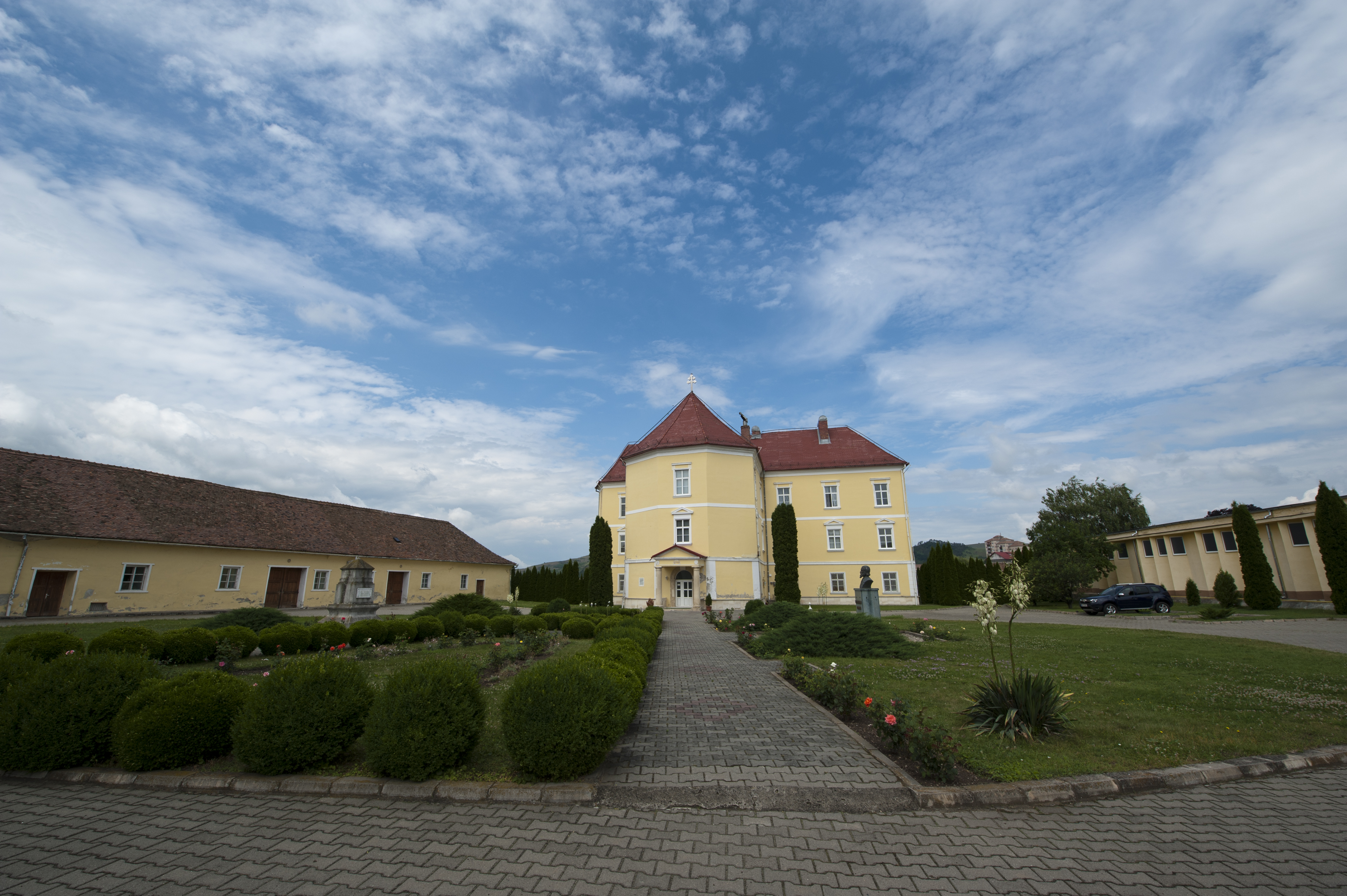 Reședința mitropolitană 01